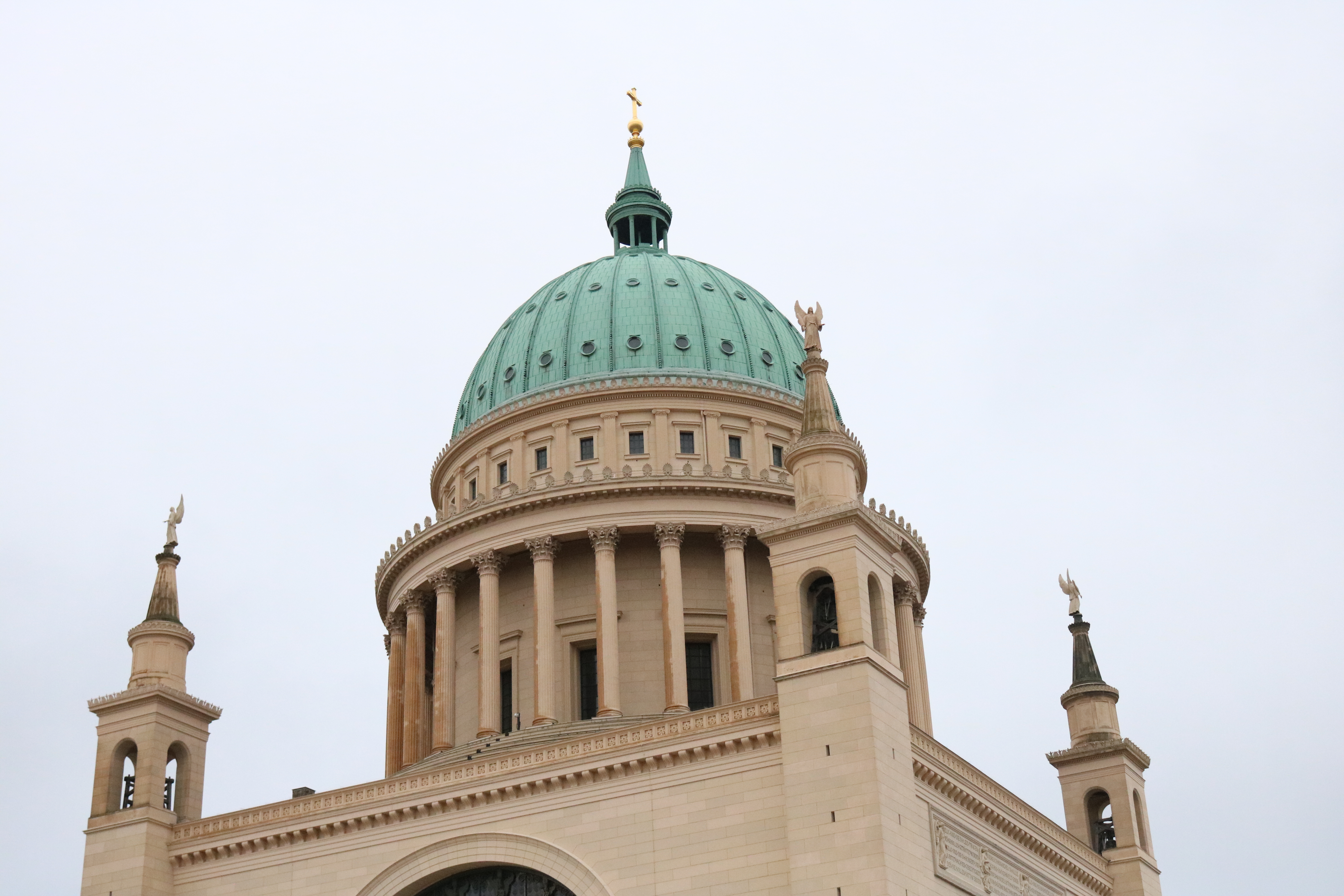 St. Nicholas' Church in Potsdam. March 2019.